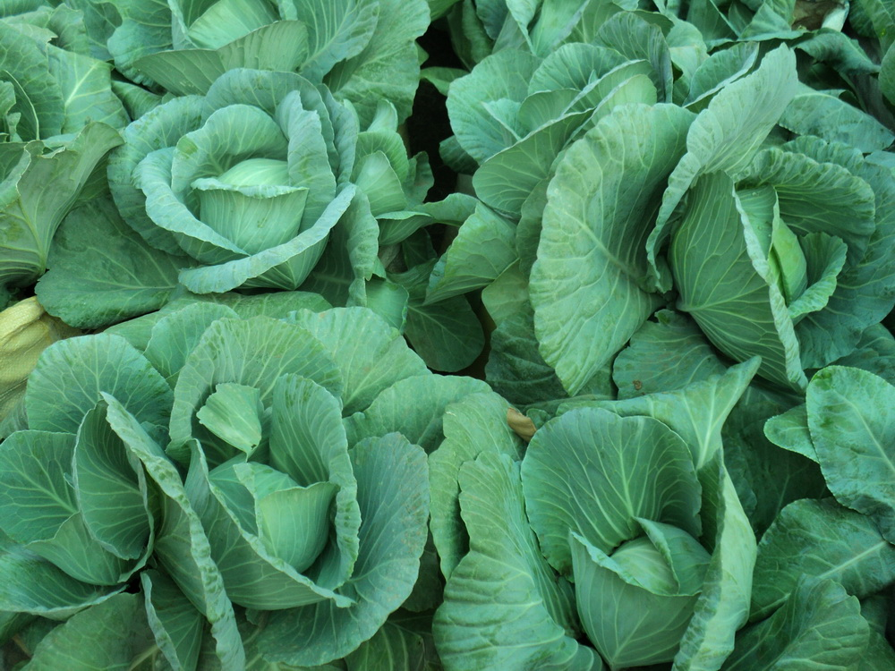 കാബേജ്